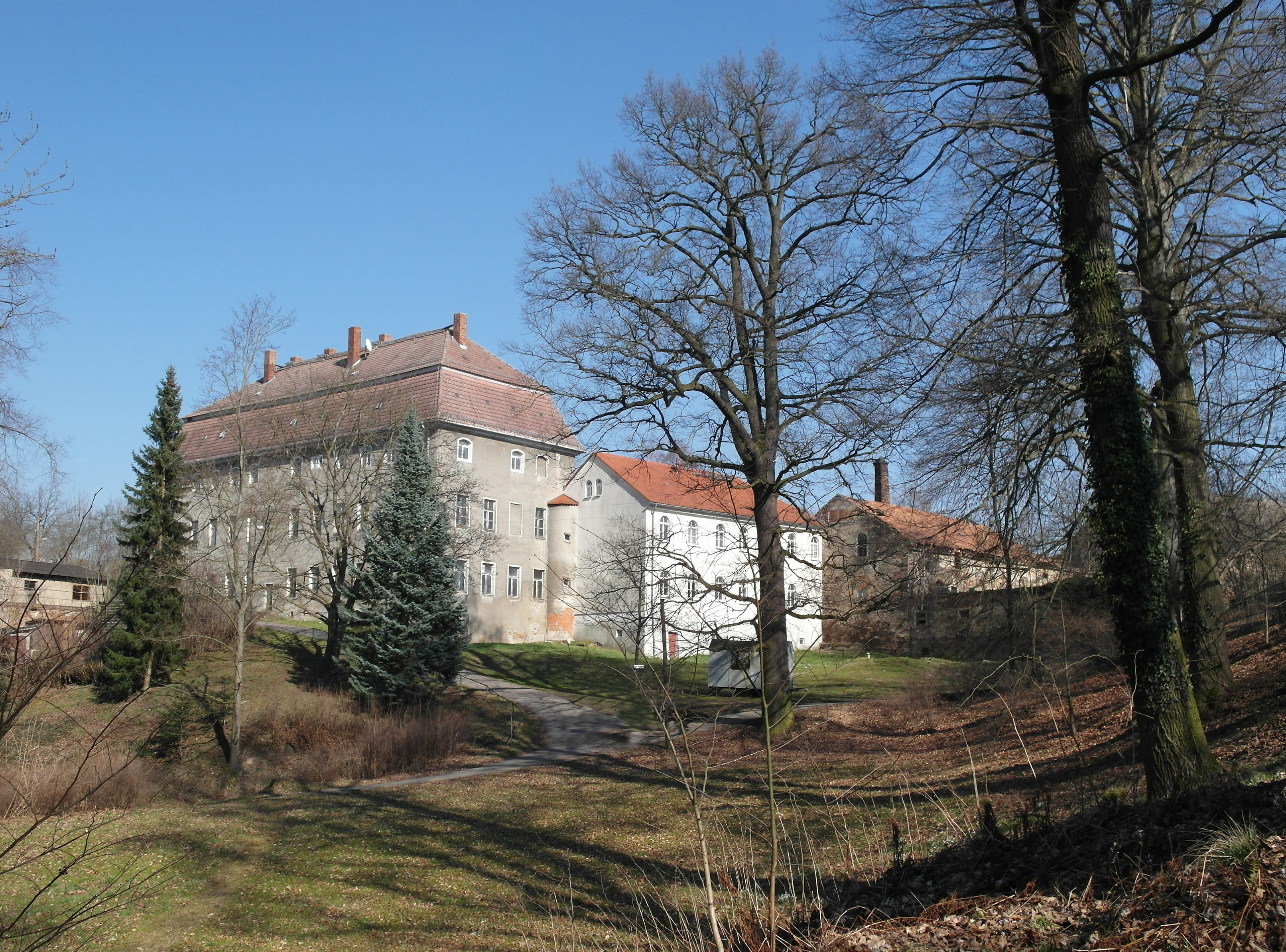 19.03.2015 01683 Tanneberg (zu Klipphausen): Schloß Tanneberg aus dem Park von Südwesten. Am Rittergut 1 [SAM.JPG]20150319810DR.JPG(c)Blobelt